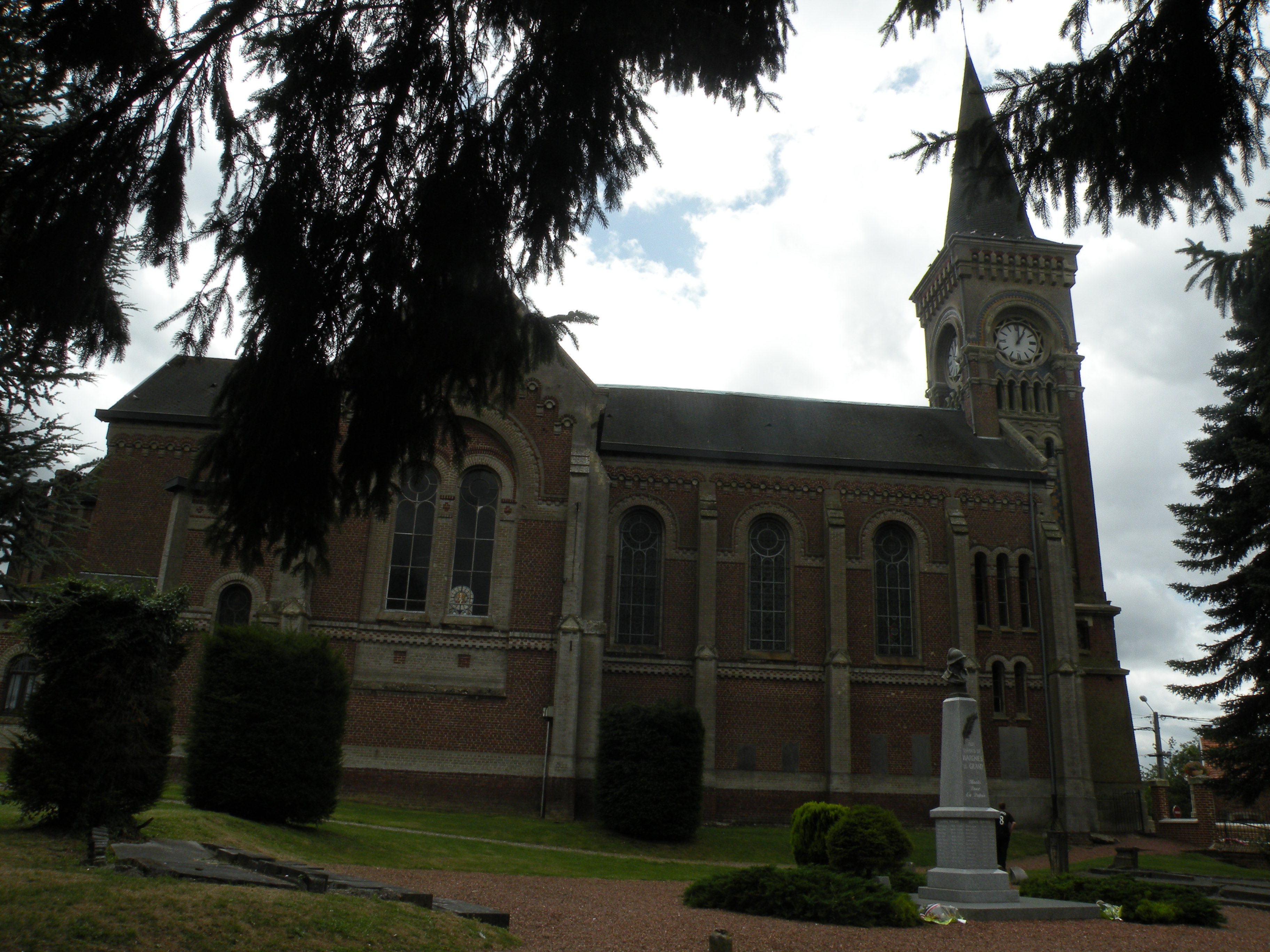 eglise Wargnies-le-Grand